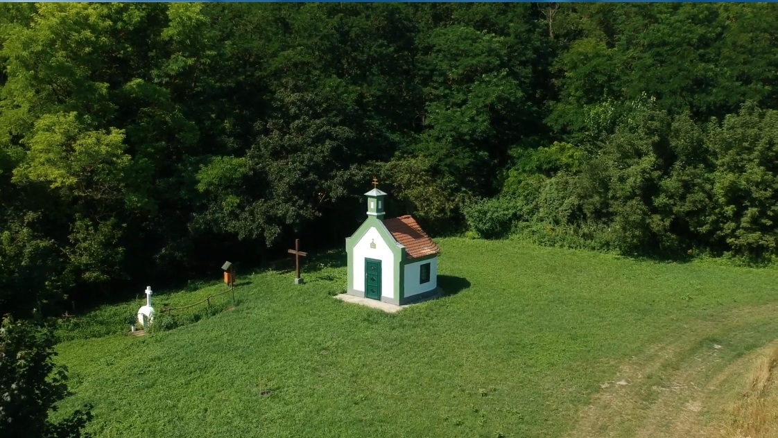 A kápolna 1907-be építette Csima Ferenc